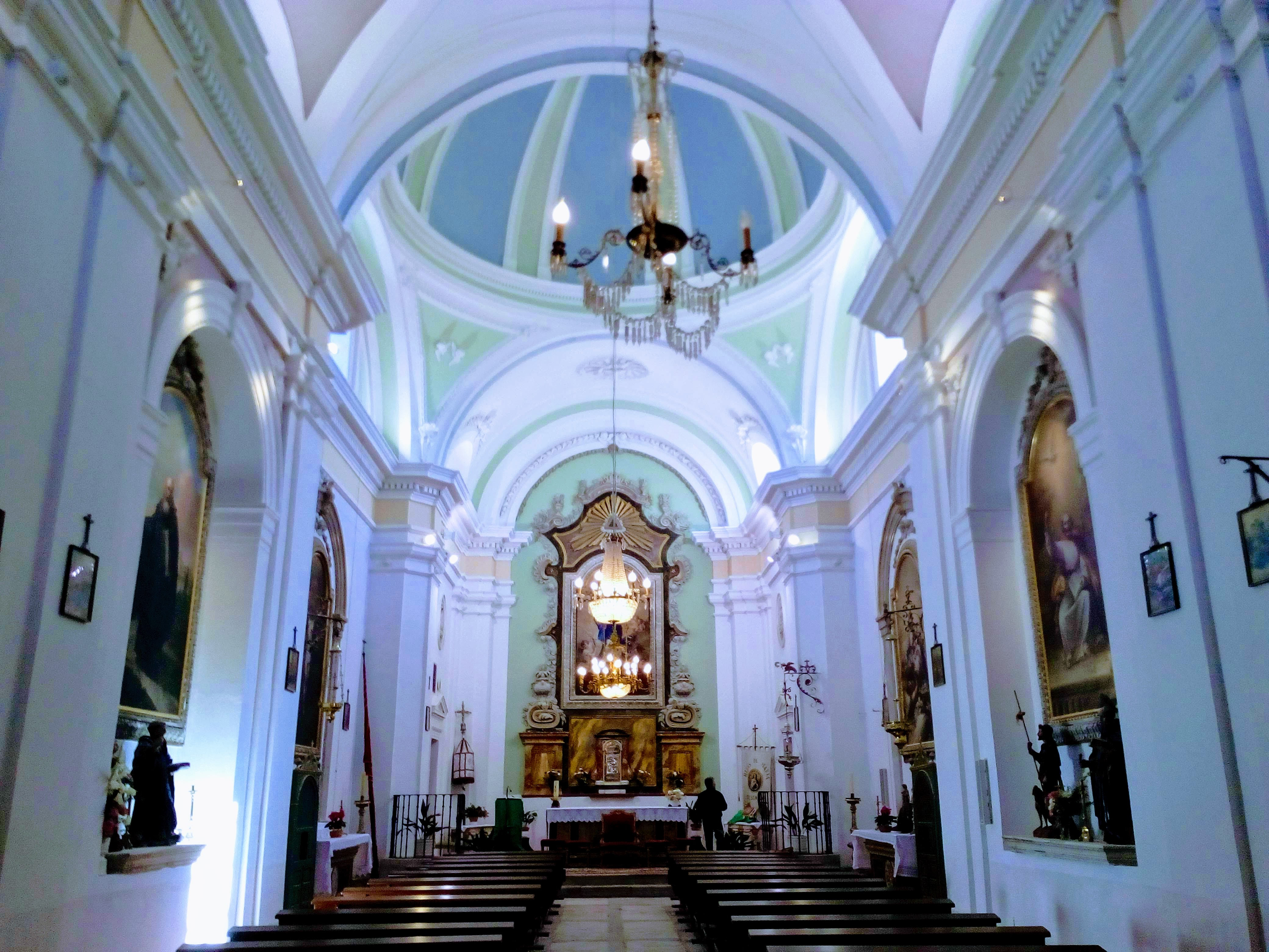 El interior de la iglesia del municipio de Trescasas recién reformada en 2019.